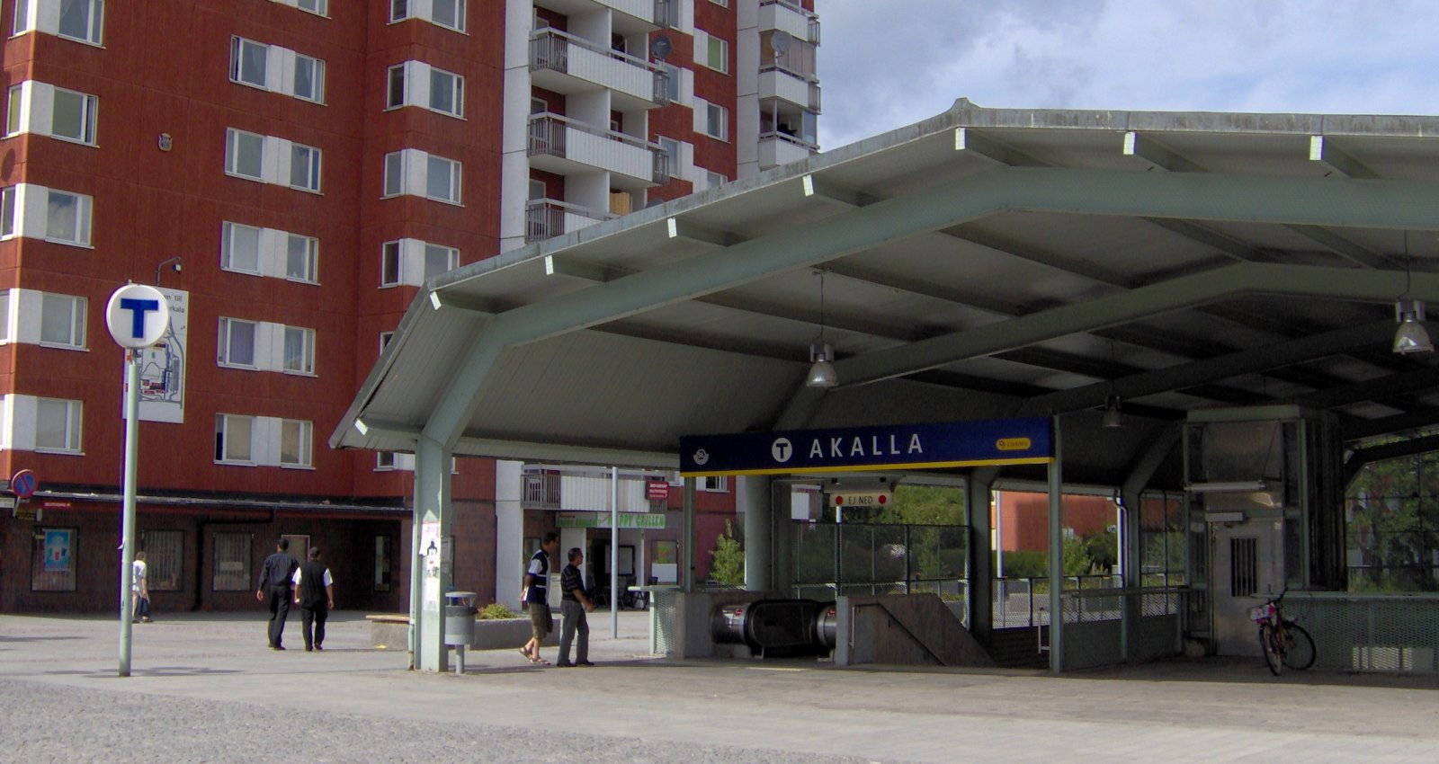 Entrance to Stockholm metro station Akalla from Akalla torg.